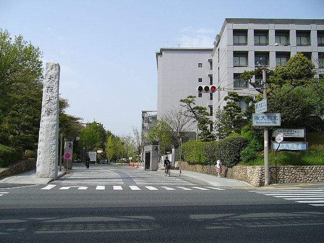 Osaka university, Toyonaka campus, Front gate